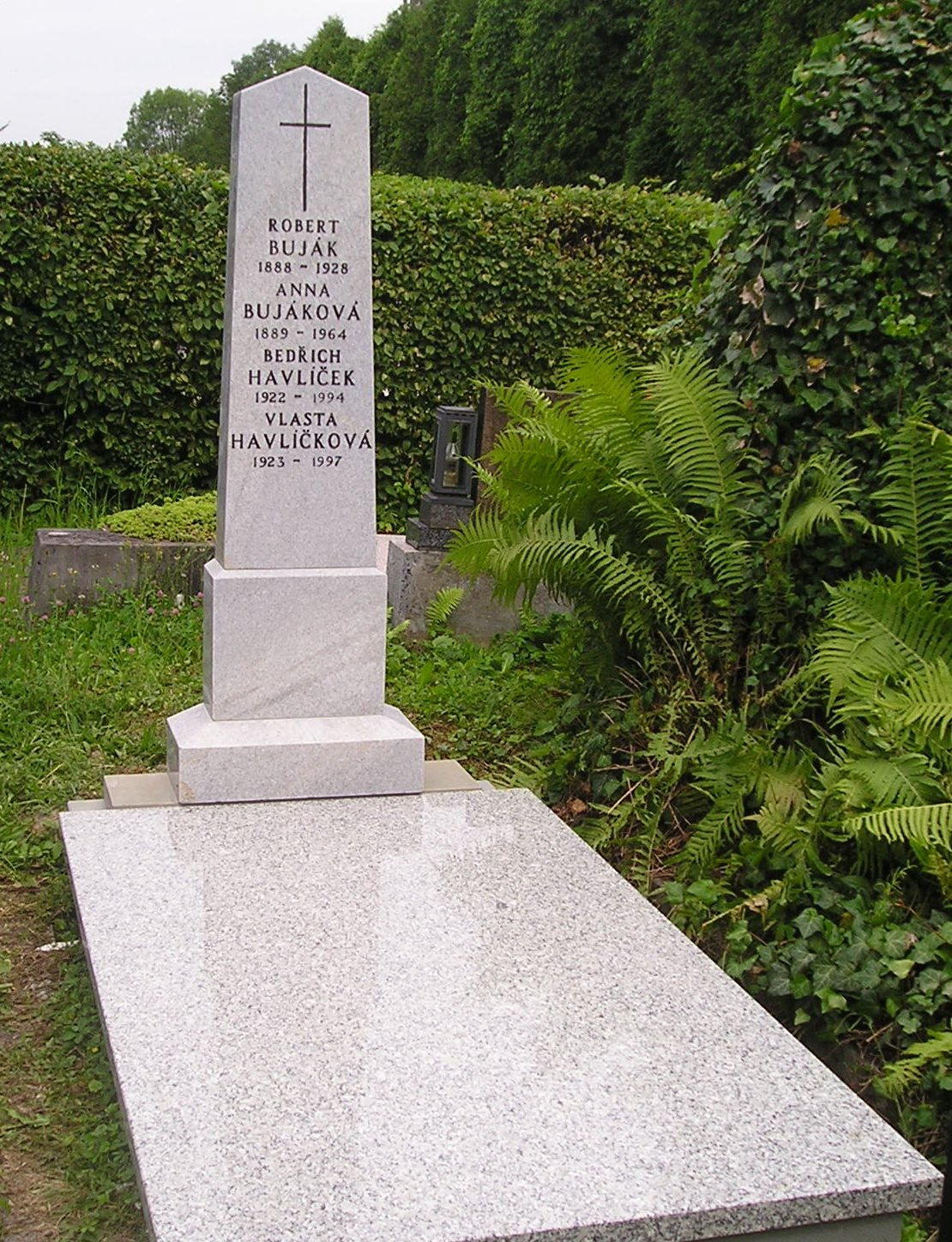 Hrob Bedřicha Havlíčka na Těšínském hřbitově